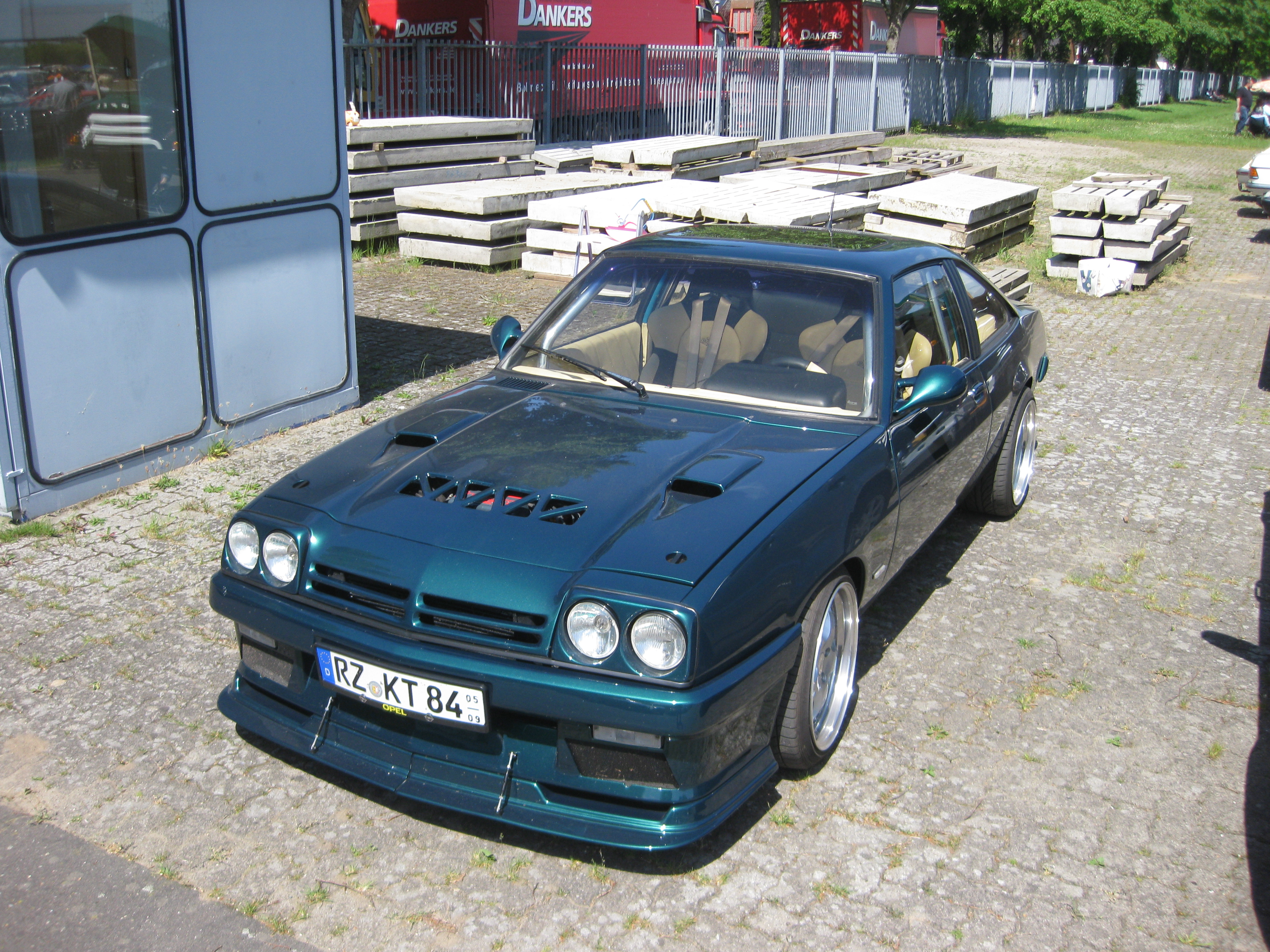 Opel Manta B mit Bodywork